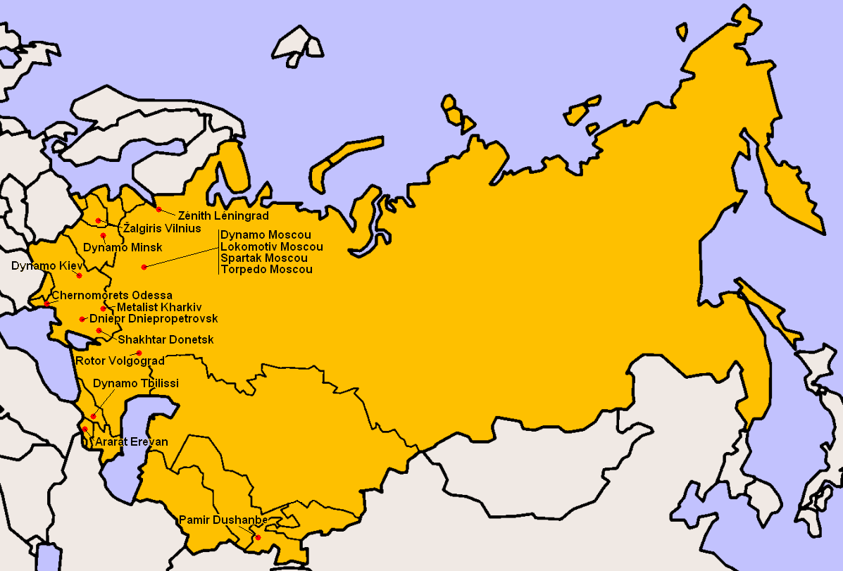 Clubs participants à la Division Supérieure 1989